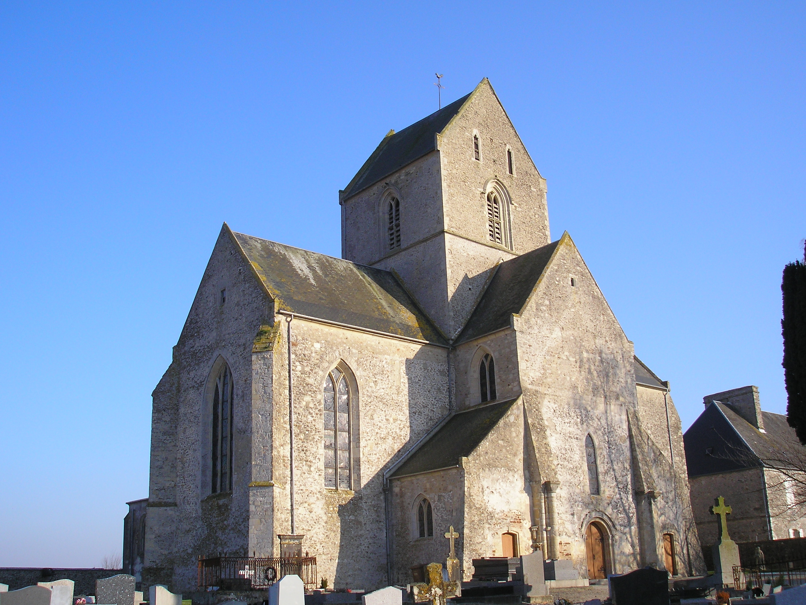 Saint-Fromond (Normandie, France). L'église prioriale Notre-Dame-et-Saint-Fromond.